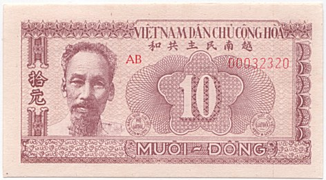 Vietnam Dongs.